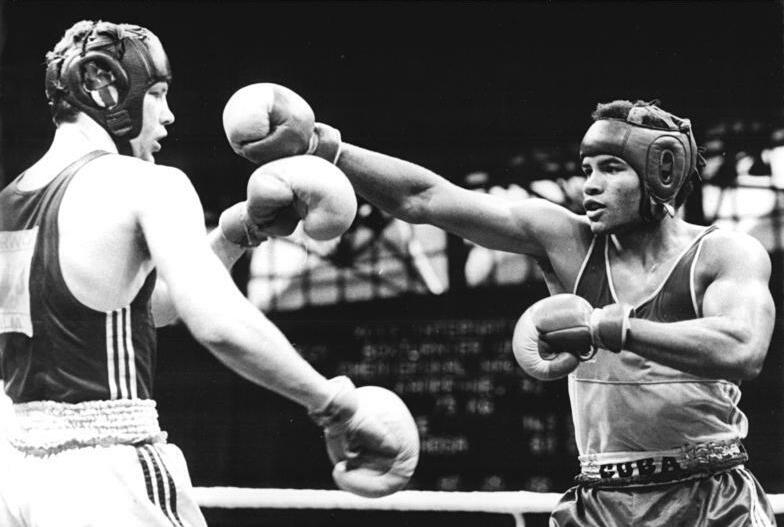 Henry Maske, Angel Espinosa ADN-ZB Lehmann 6.3.88 Halle: XVII. Internationales Boxturnier um den Chemiepokal-Zu einer Neuauflage des Weltcupfinales von 1987 kam es im Mittelgewicht, das erneut Weltmeister Angel Espinosa (Kuba, r.) gegen seinen schärfsten Rivalen Henry Maske, Weltcupzweiter, eindeutig mit 5:0 Richterstimmern für sich entschied.